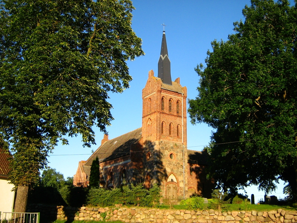 Kirche in Siedenbrünzow (Landkreis Mecklenburgische Seenplatte, Vorpommern).